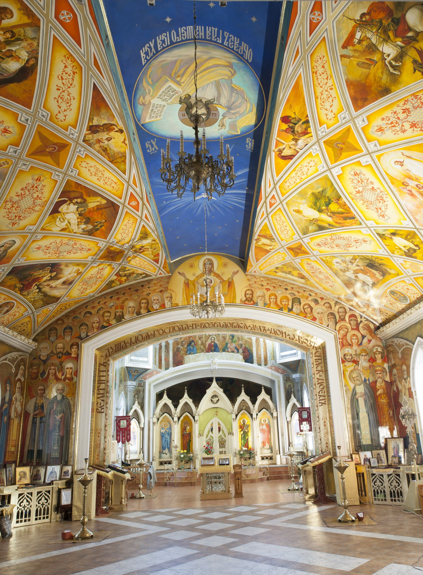 Вид внутри церкви Храм Всех святых Феодосия